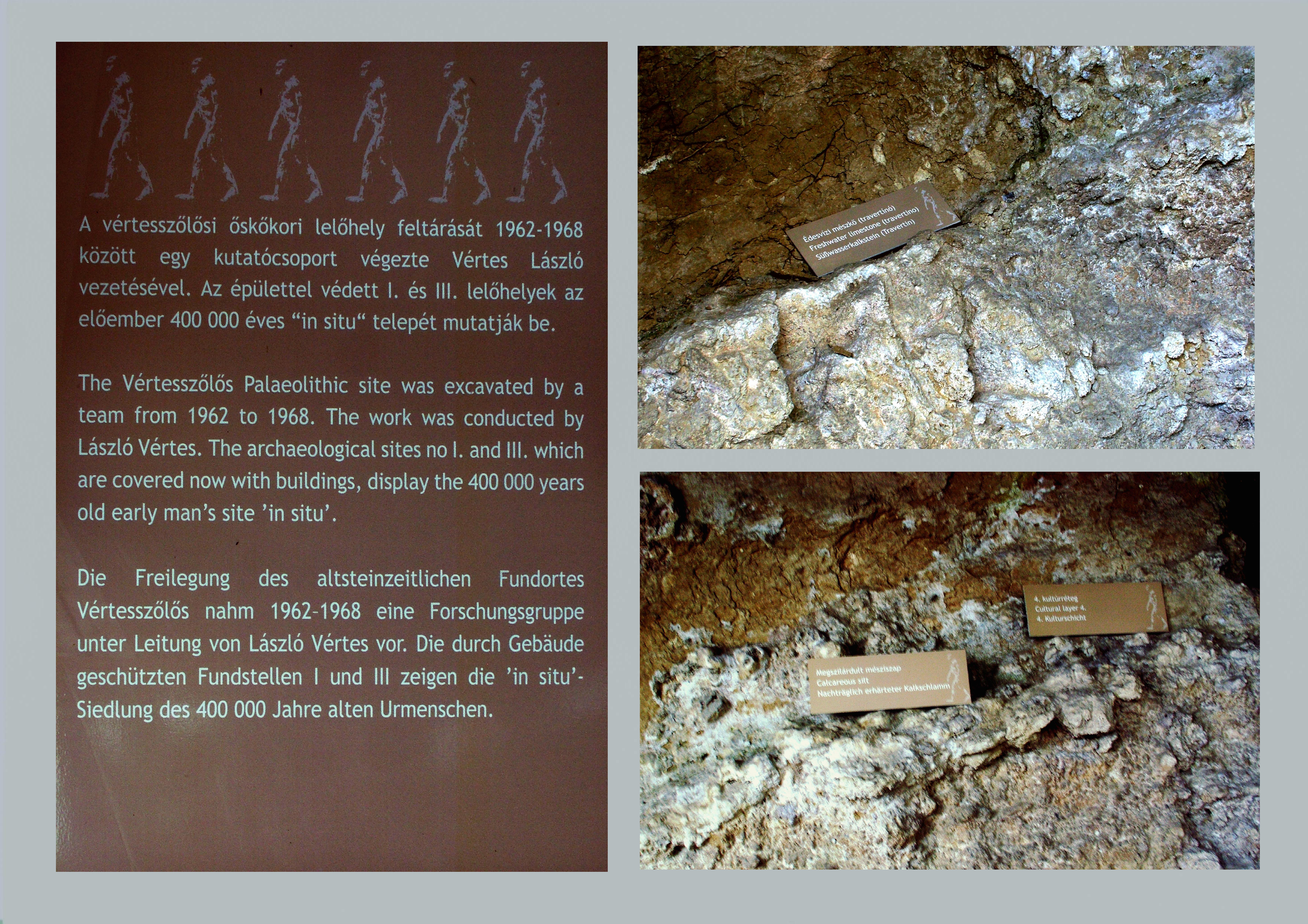 Régészeti helyszínek (Vértesszőlős Őstelep)